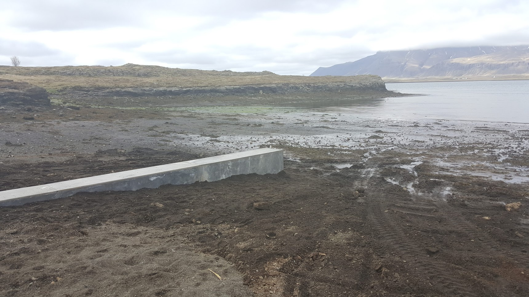 Gorvík í Grafarvogi að vorlagi í maí 2020